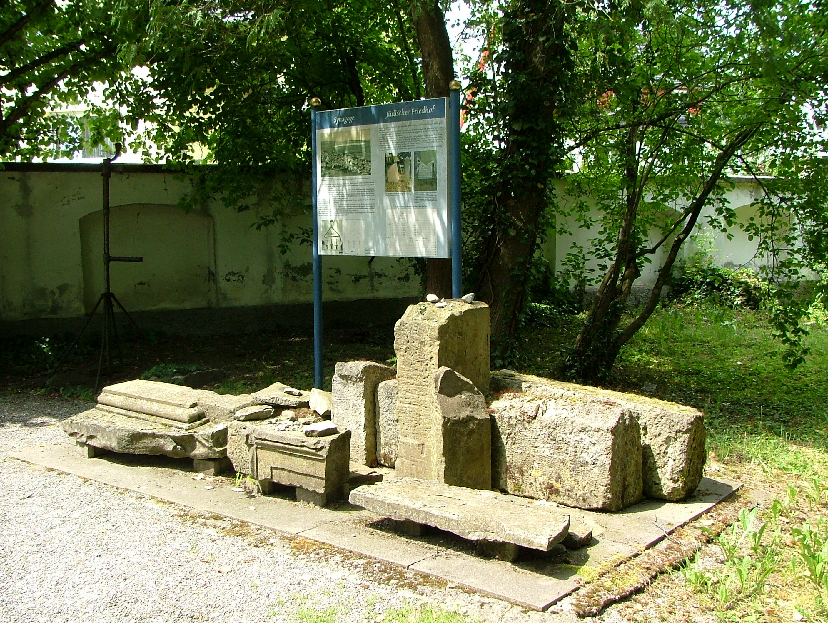 Am Eingang